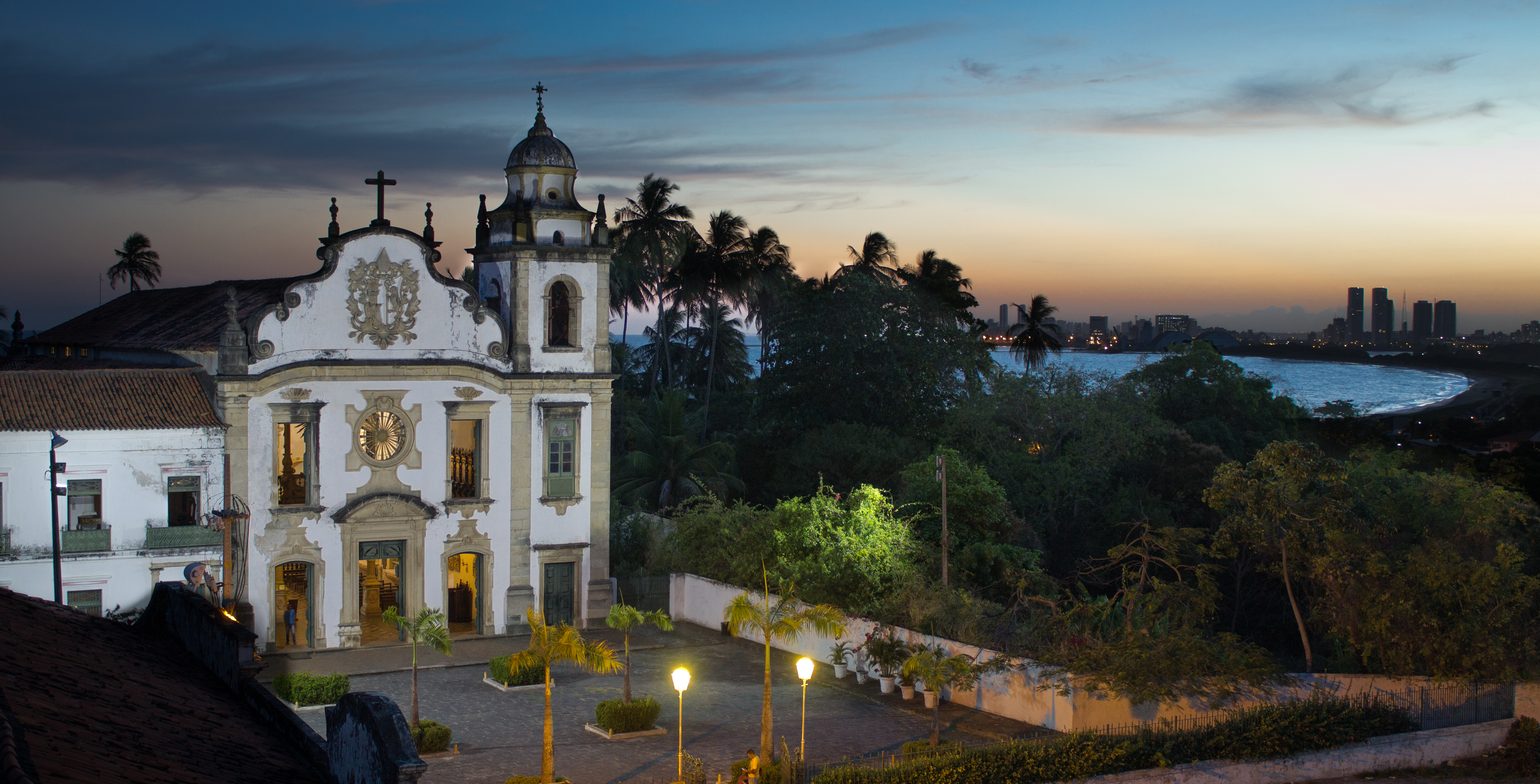 Mosteiro de São Bento de Olinda, construção de 1761.